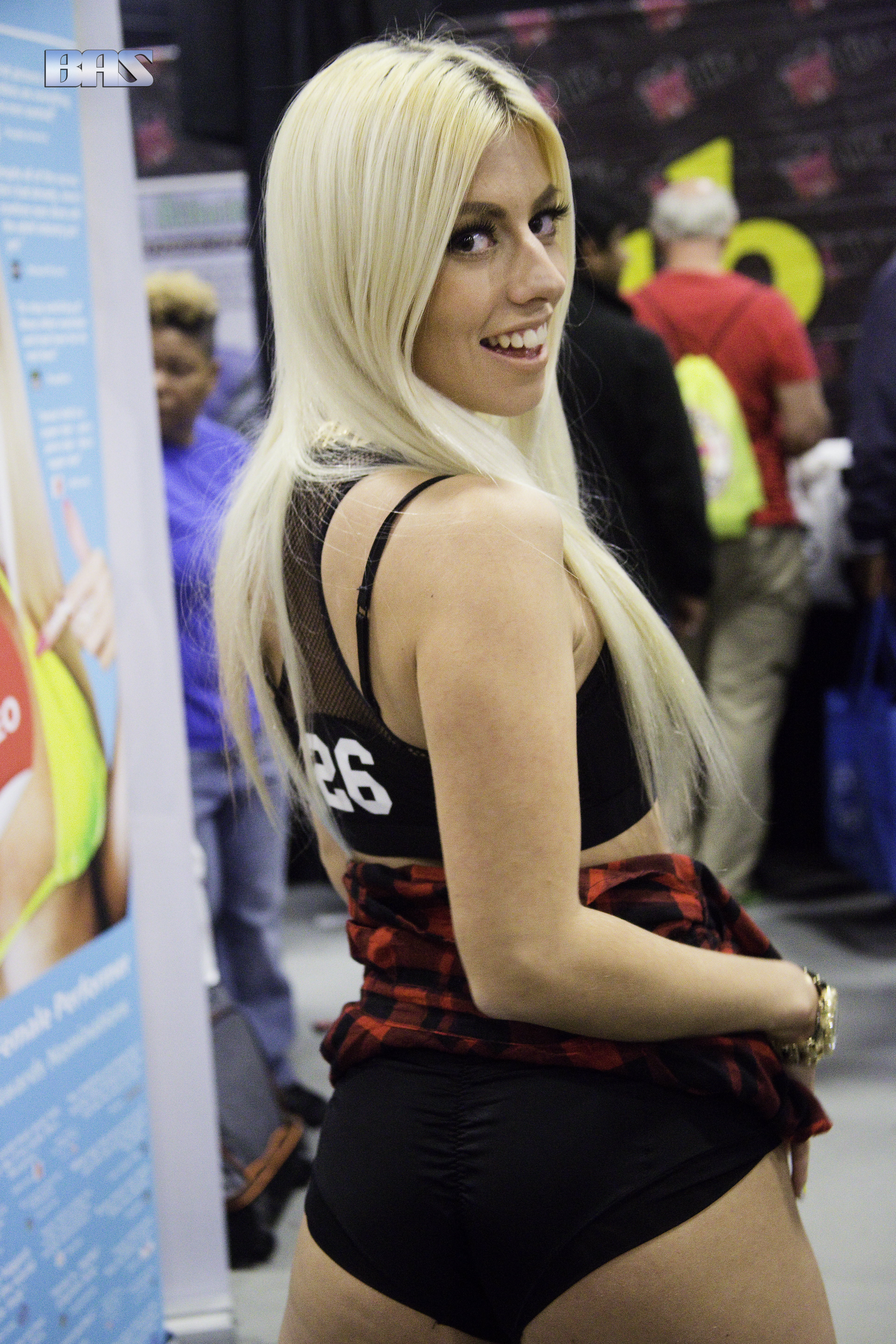 EX15_0216bas